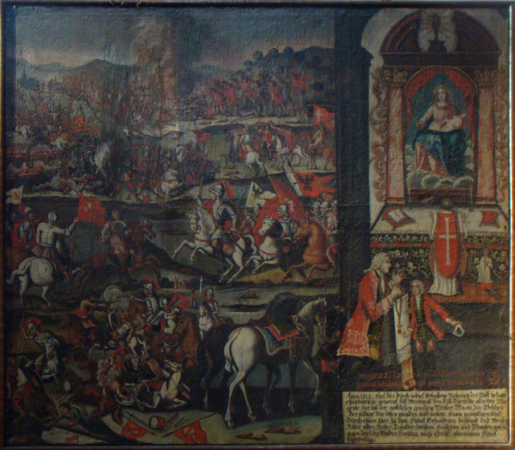 Dominikanerkirche in Bad Wimpfen: Tilly betend vor der in der Dominikanerkirche bewahrten Sitzenden Madonna, wähend im Hintergrund die Schlacht bei Wimpfen tobt.